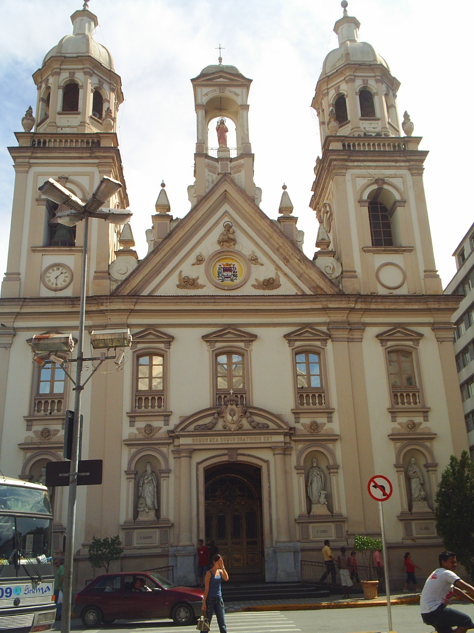 Catedral de Santo Antônio em Guaratinguetá